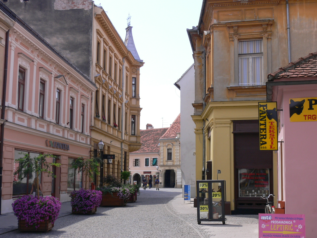 Rue varazdin